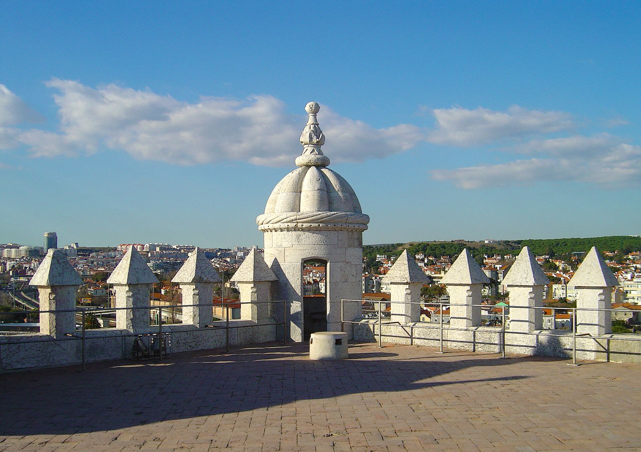 Torre de Belém - Lisboa (Portugal)